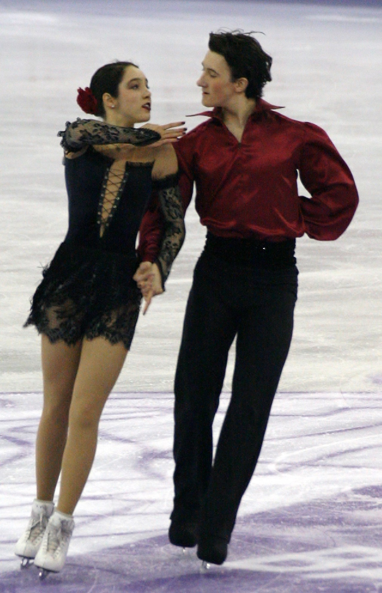 Лоррейн Макнамара и Квин Капентер (США) на финале Гран-при по фигурному катанию среди юниоров 2015-2016.